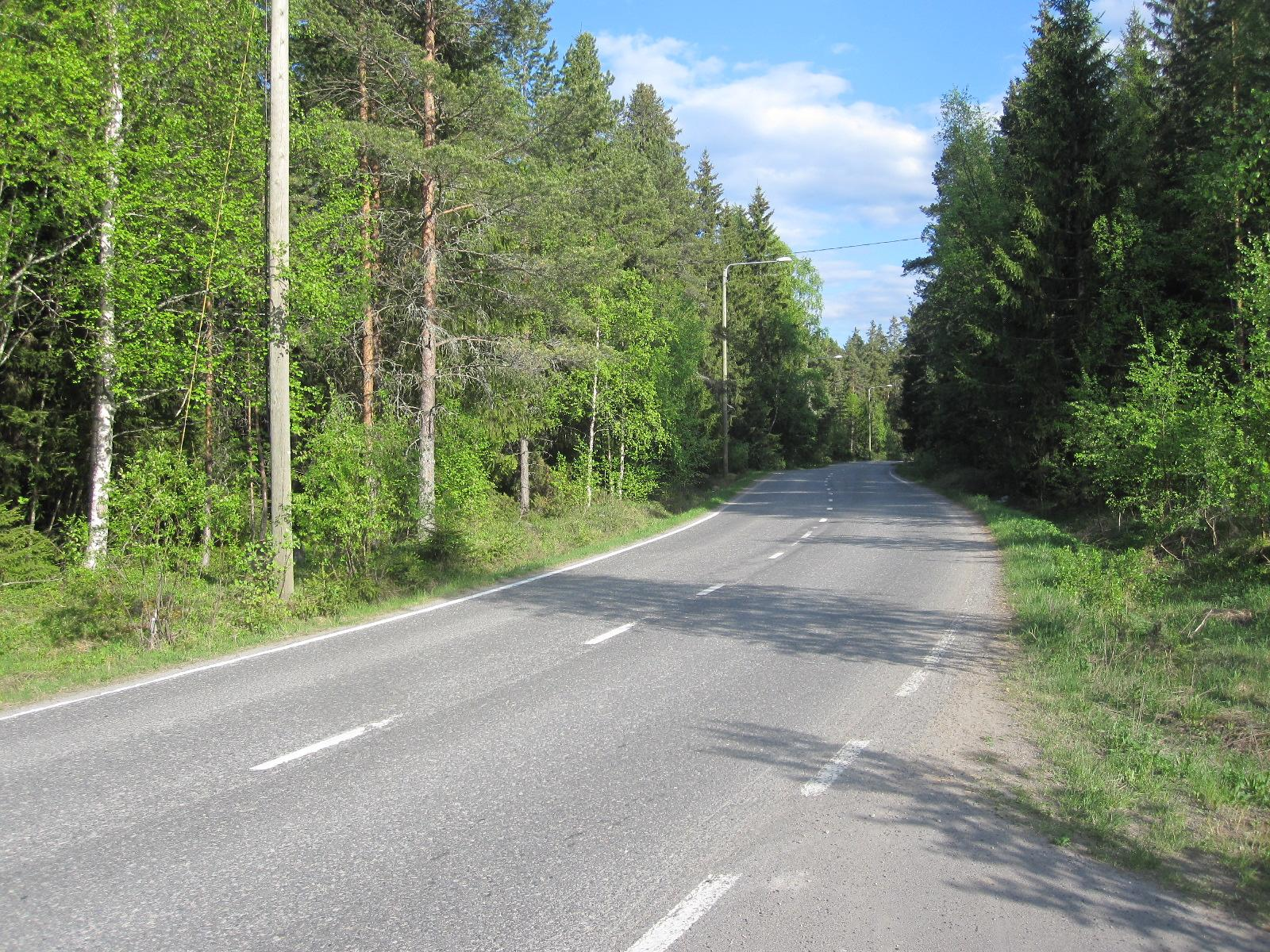 Kempeleen Alakylän tärkein tieyhteys Vihiluodontie (paikallistie 18680). Näkymä Kempeleen suuntaan.